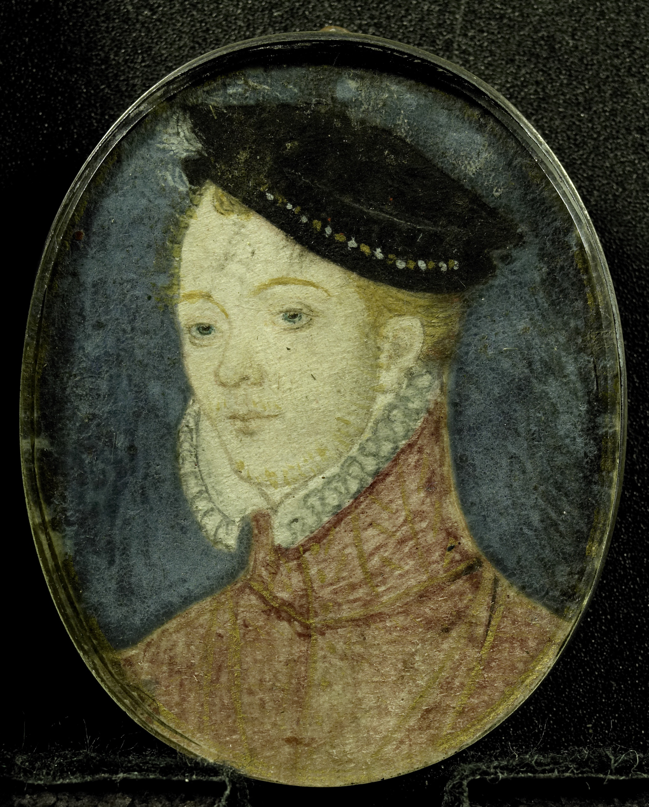 Portret van Henry Stewart (1546-1567), Lord Darnley. Echtgenoot van Maria Stuart. Buste, naar links. Op het hoofd een baret. Onderdeel van de collectie portretminiaturen.